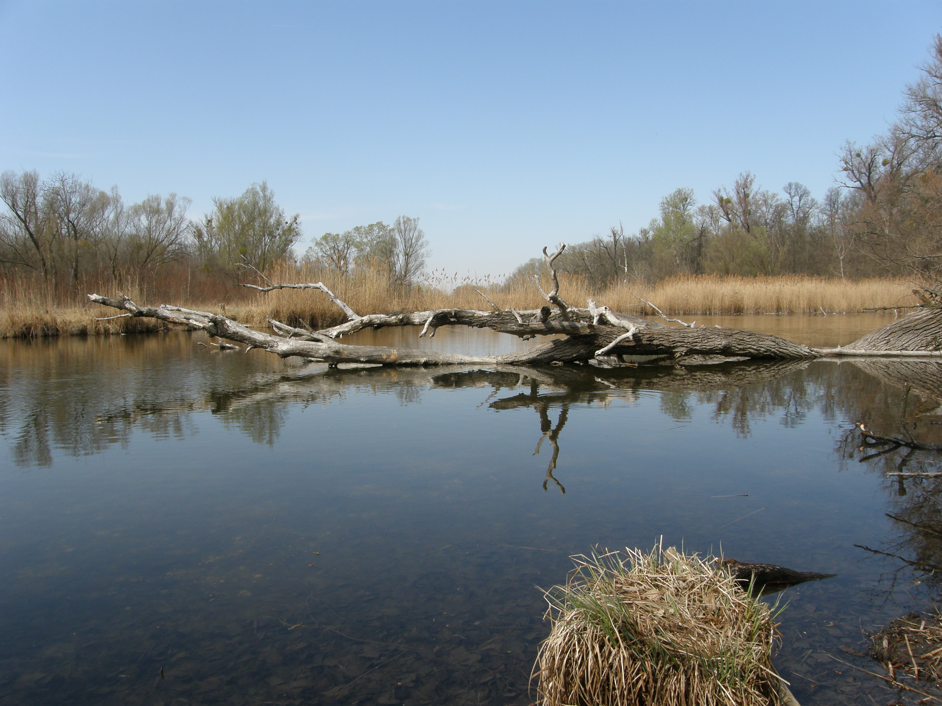 Frühling in der Lobau, Wien